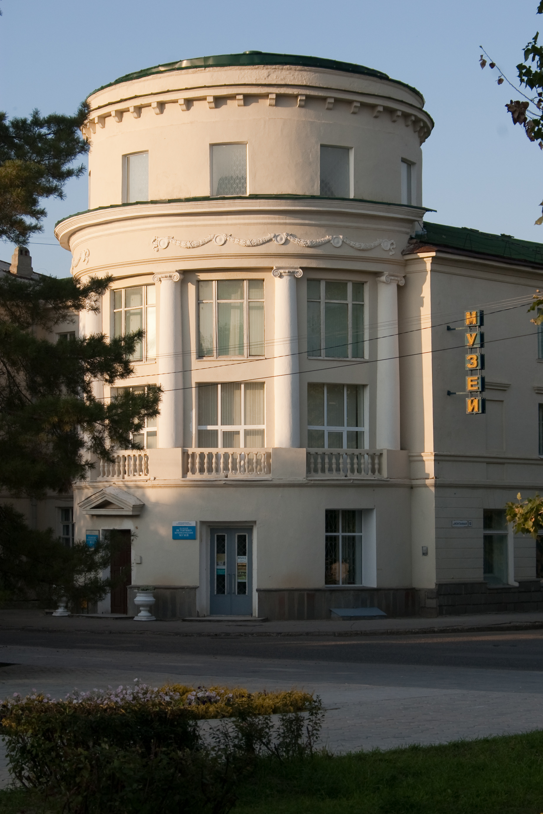 Здание Краеведческого музея в г. Волжский, Волгоградской области, ул. Фонтанная, 10.